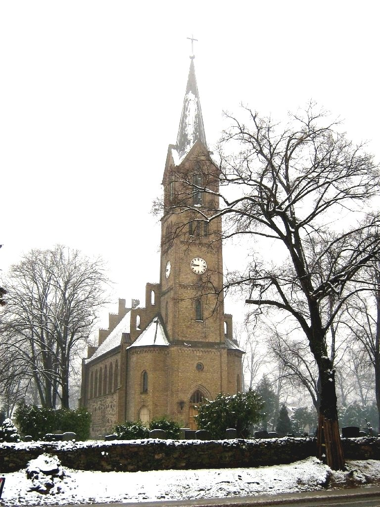 Dorfkirche in Glindow, Brandenburg (Germany), Baumeister Friedrich August Stüler